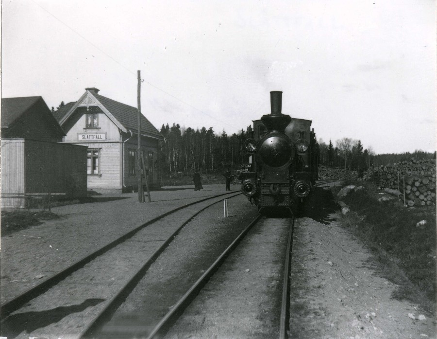 Slättfall railway station on Vimmerby-Spångenäs Järnväg in Sweden